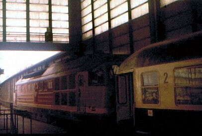 Transit-D-Zug im Bahnhof Berlin Zoo mit DR Baureihe 132